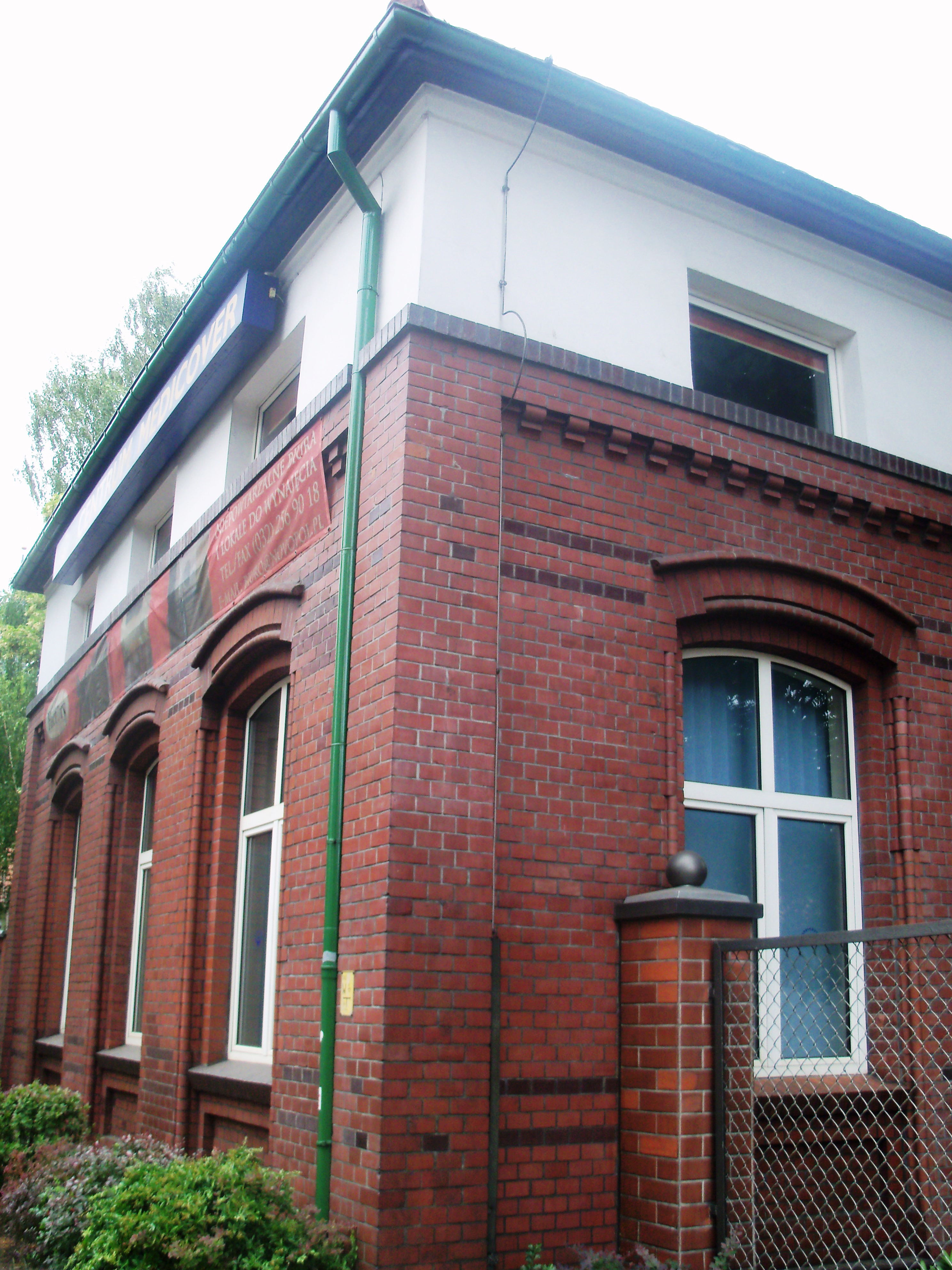 Katowice-Szopienice: ulica ks. bpa Herberta Bednorza - jeden z budynków dawnego browaru braci Mokrskich